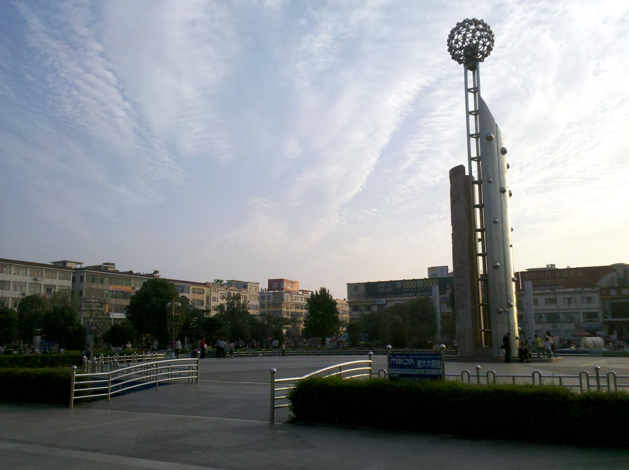 固始县陈元光广场